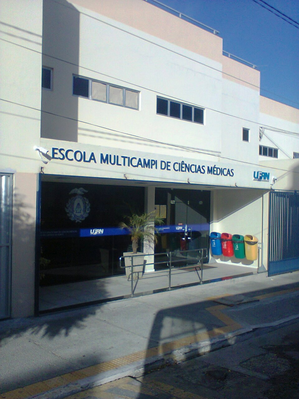 Escola Multicampi de Ciências Médicas da UFRN, Campus Caicó/RN